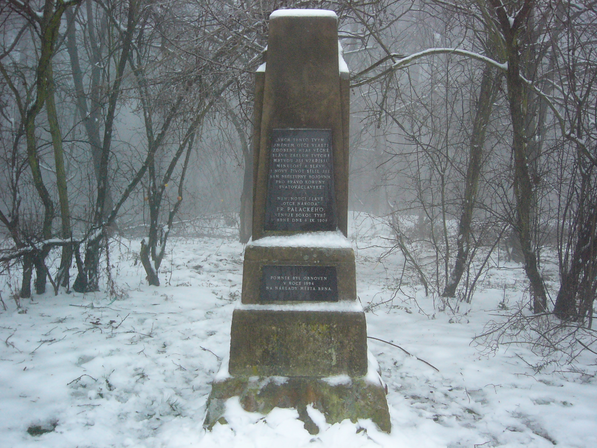 Pomník Františka Palackého